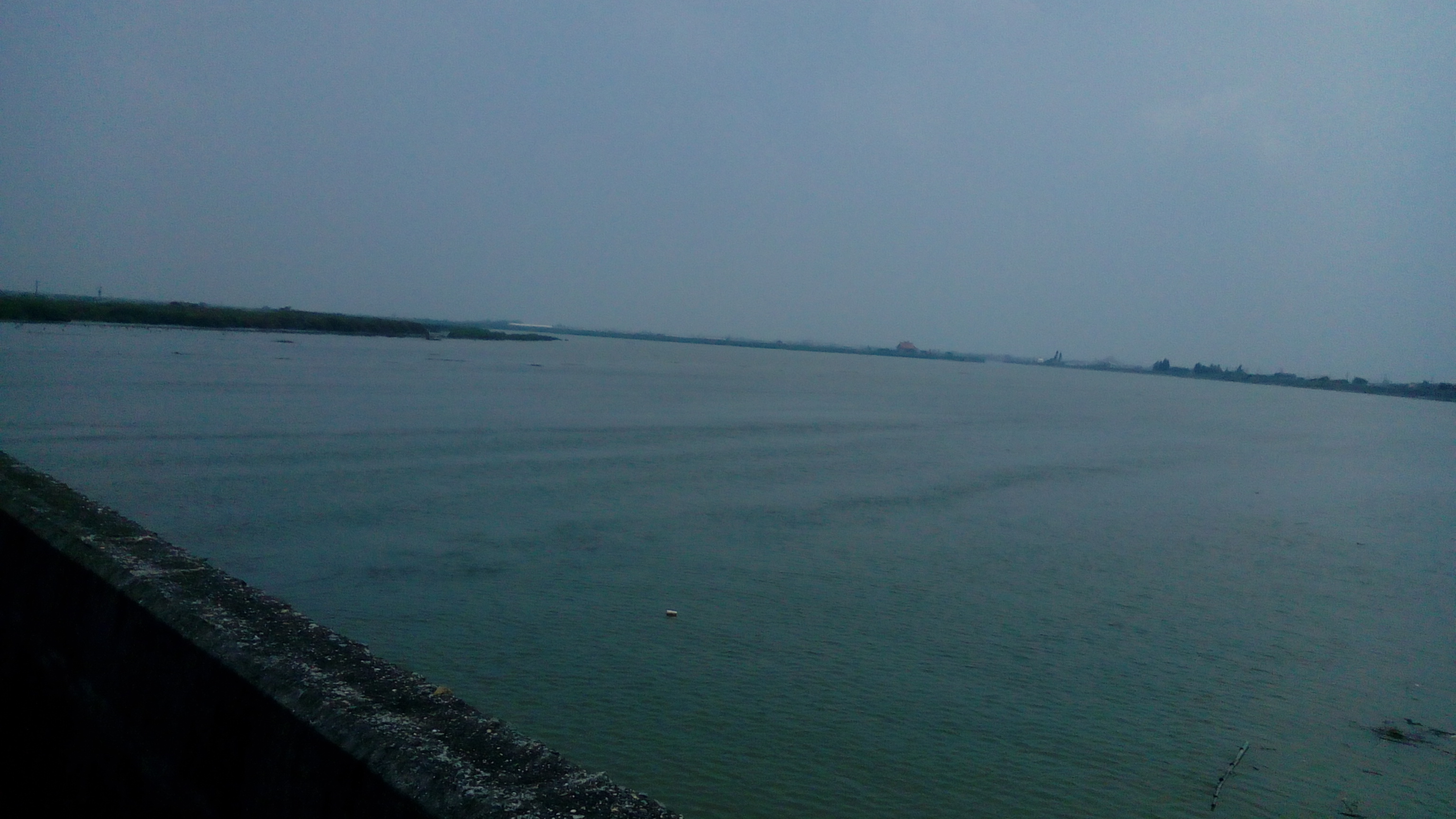 東石鄉東石南橋